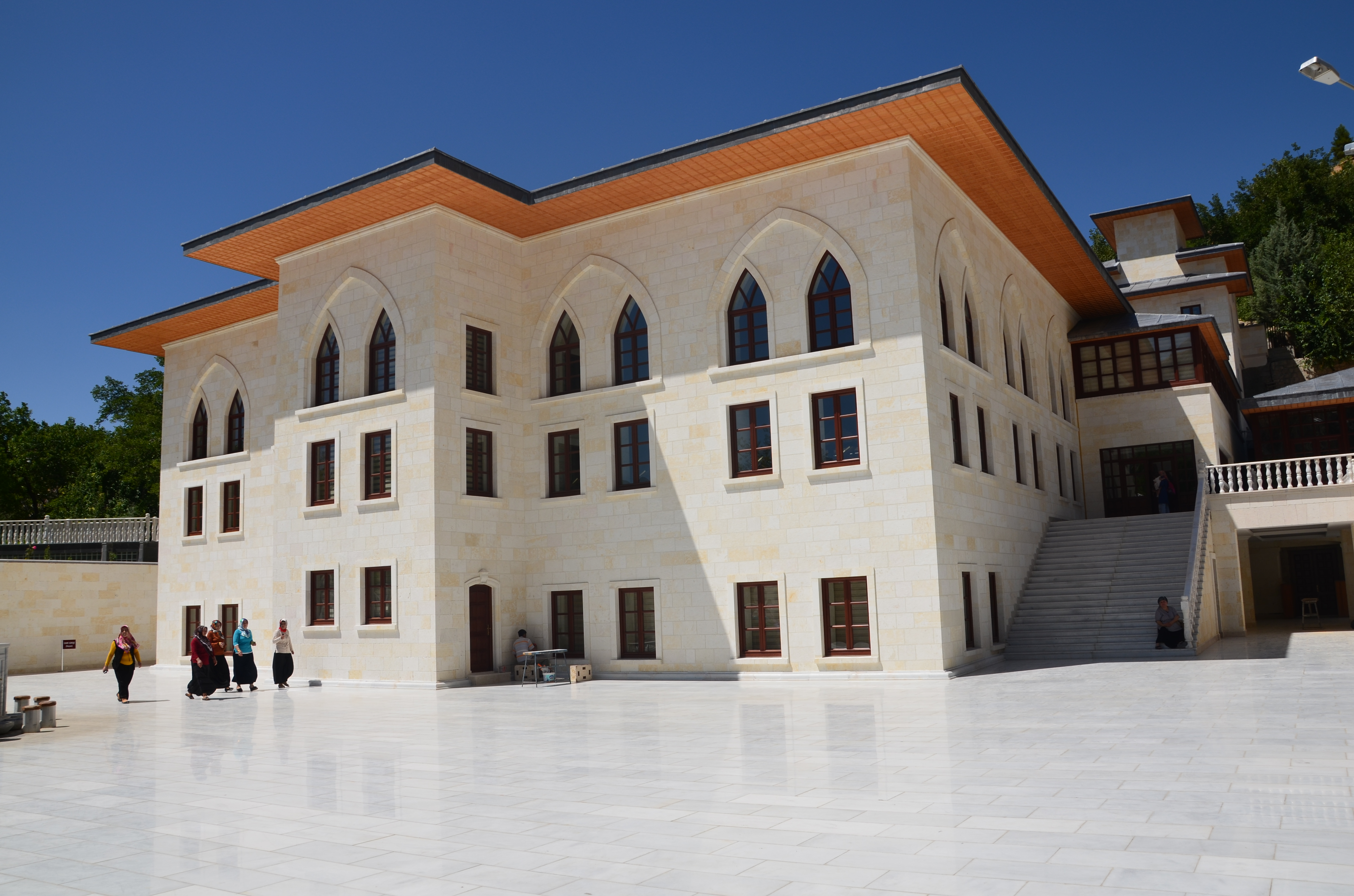 somuncu baba külliyesi